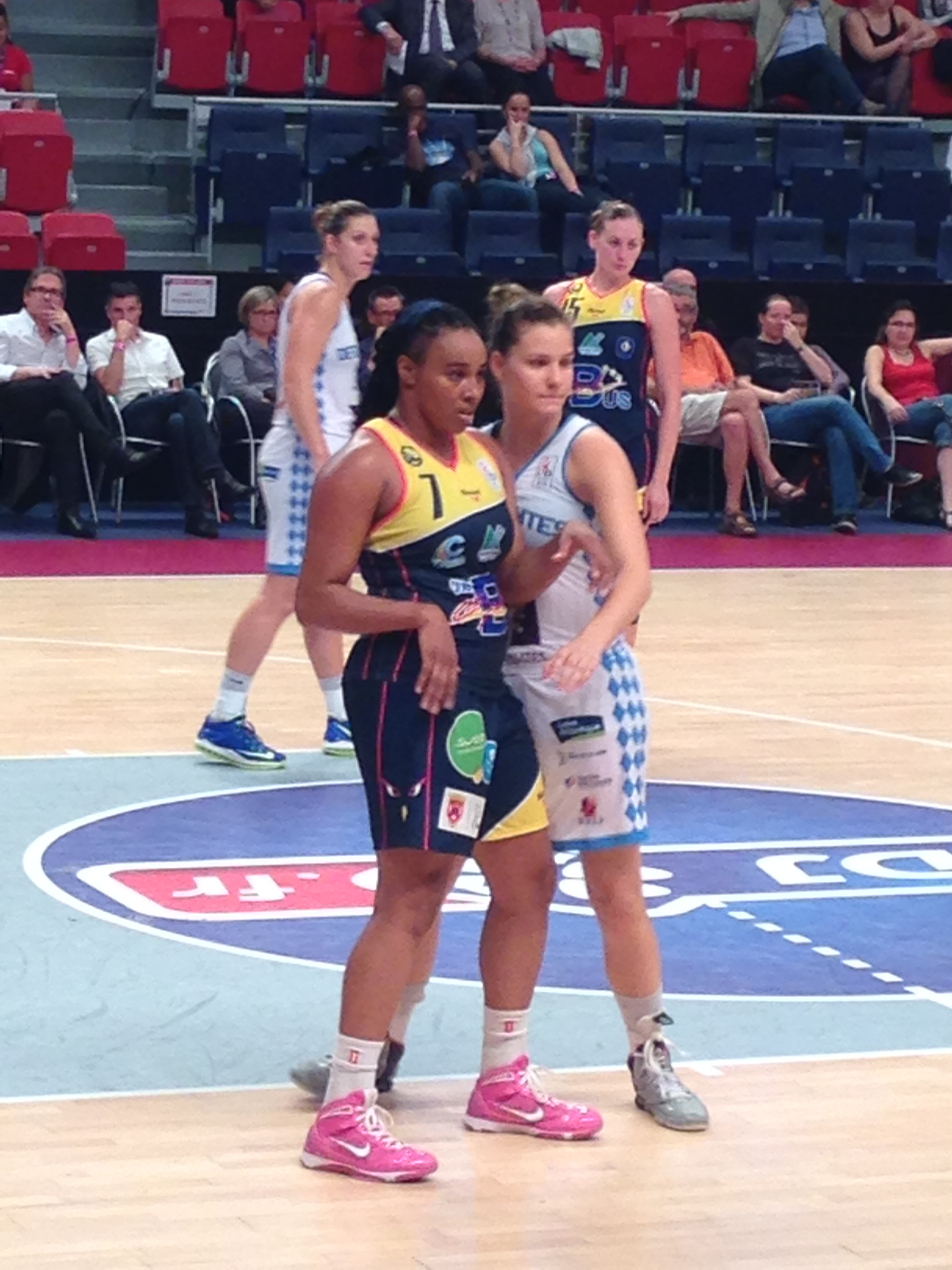 Lors du match Nantes-Calais à l'Open LFB 2014, Jasmine Hassel (en noir) face à Katia Clanet (en blanc)